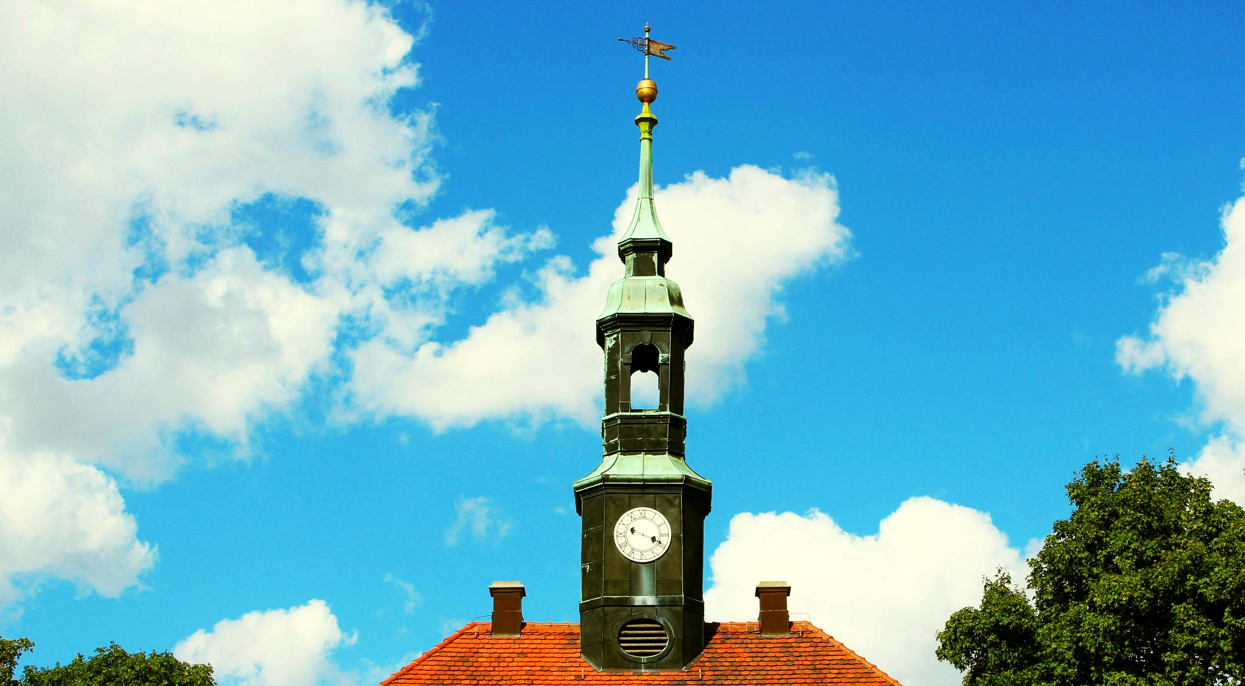 Turm der Schlosskirche Tiefenau